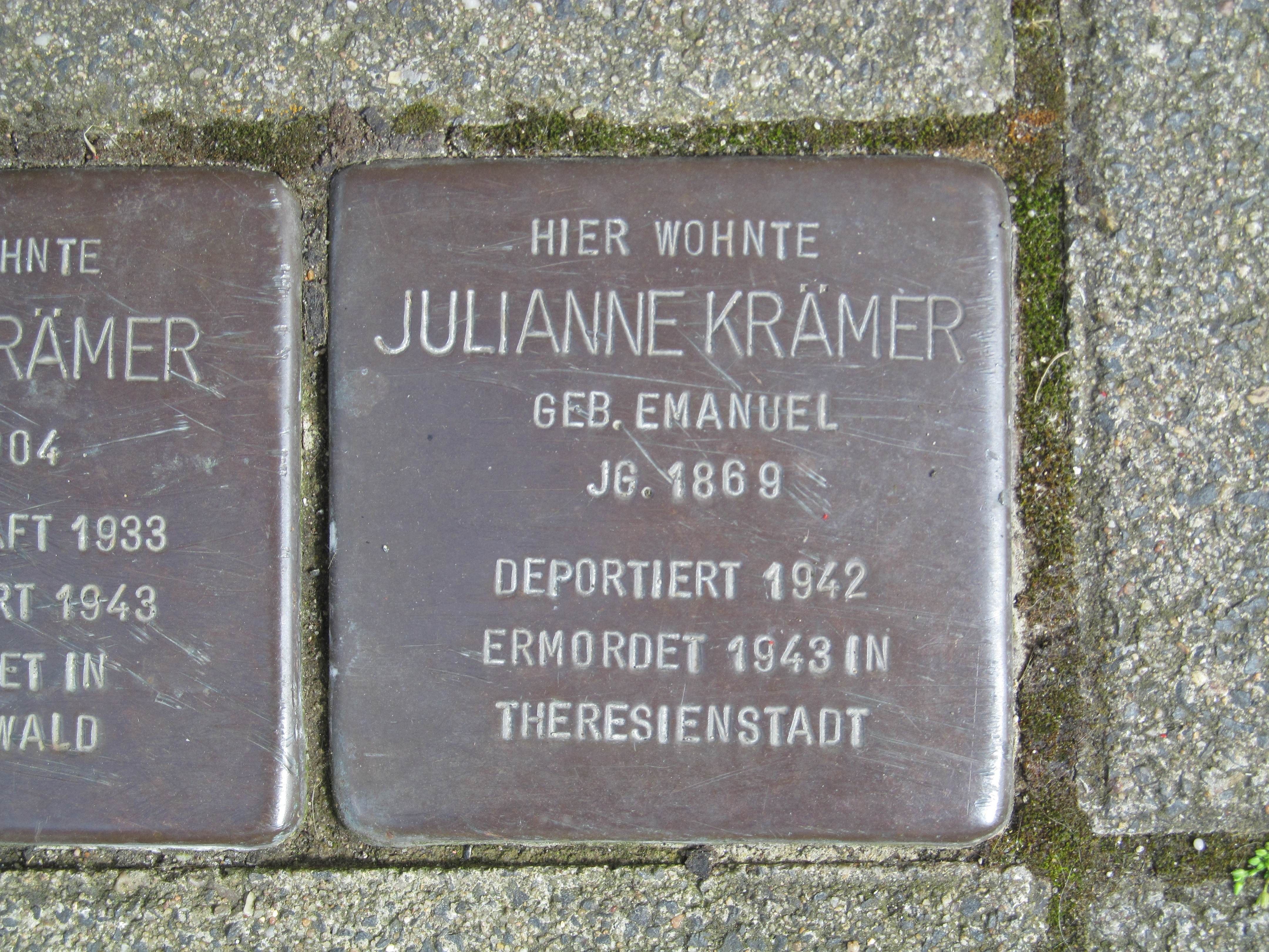 der Stolperstein für Julianne Krämer vor dem Haus Poststraße 75 in Duisburg-Hochheide